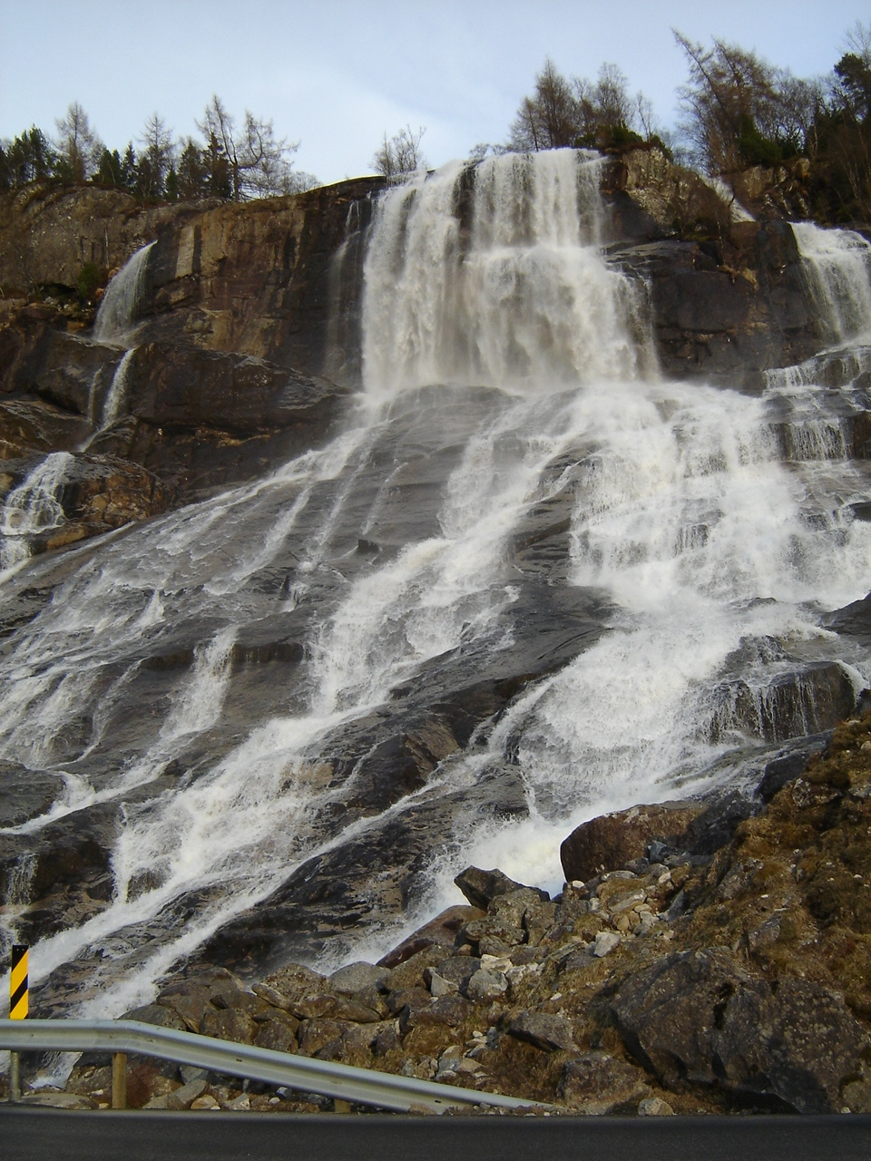 Wodospad Furebergsfossen, Kvinnherad, Norwegia; Waterfall Furebergsfossen, Kvinnherad, Norway